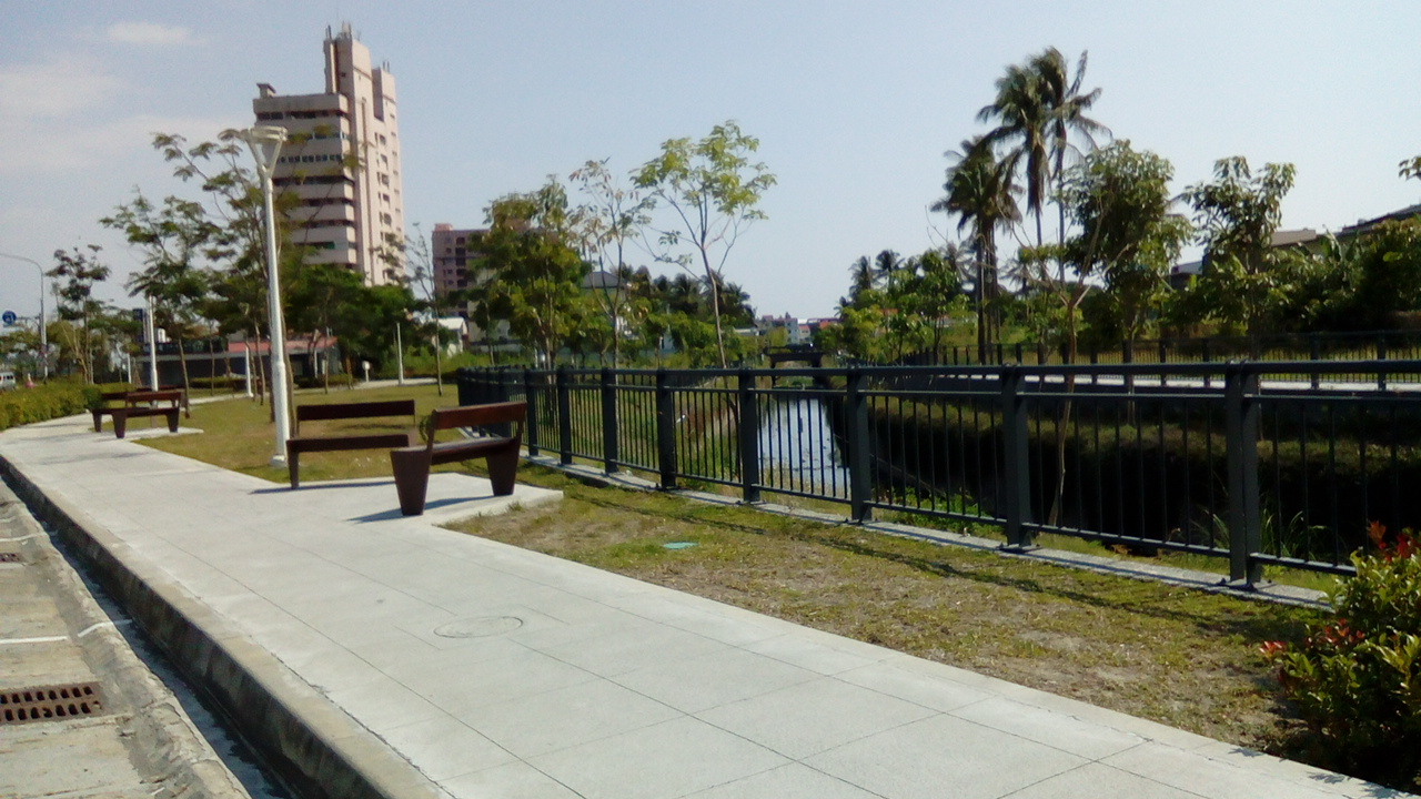 位於內山公路南下段與延平一路395巷1弄口一帶 為近年來所落成的公園景觀綠地